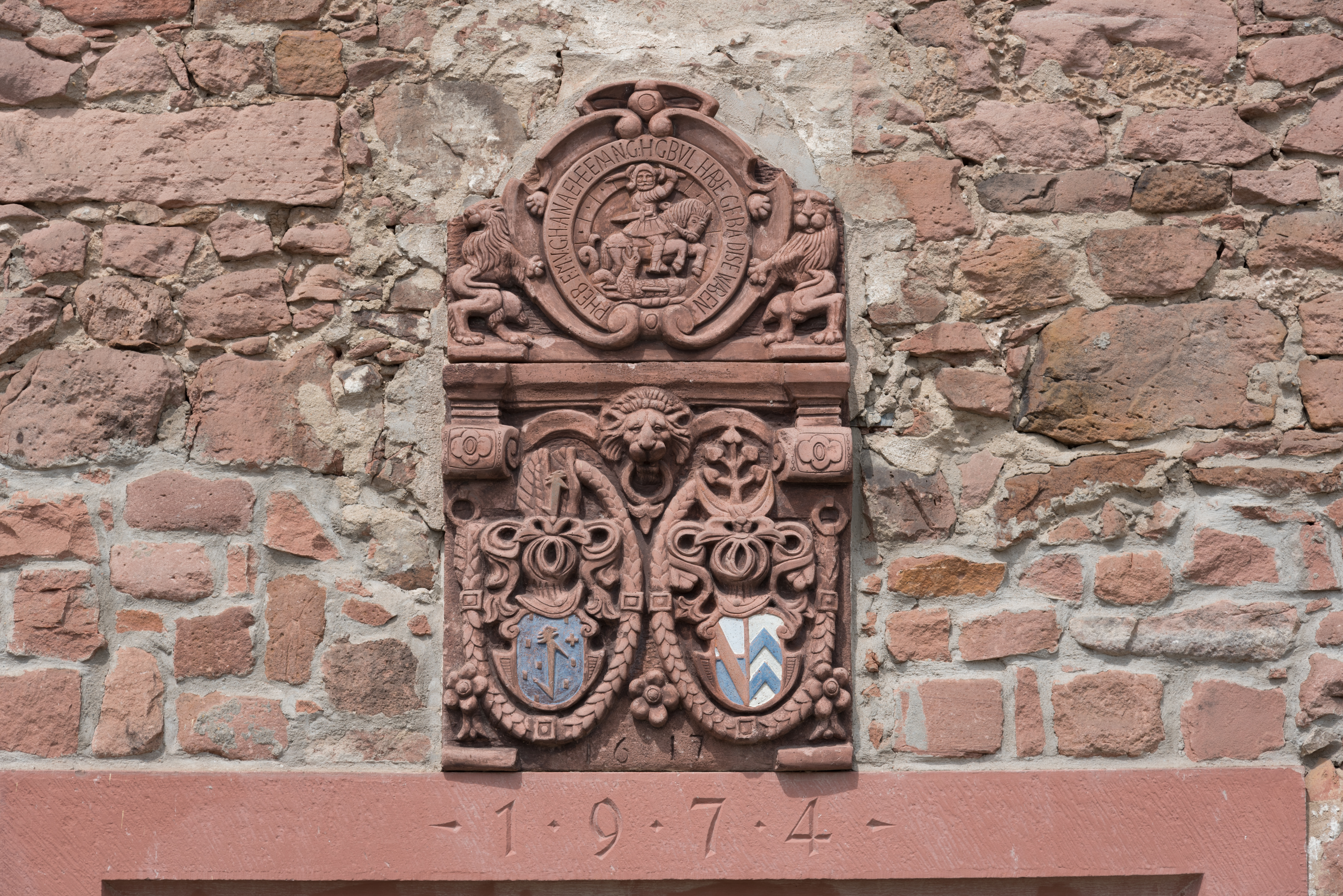 Gelnhausen, Burgstraße 2, Burgkaplanei